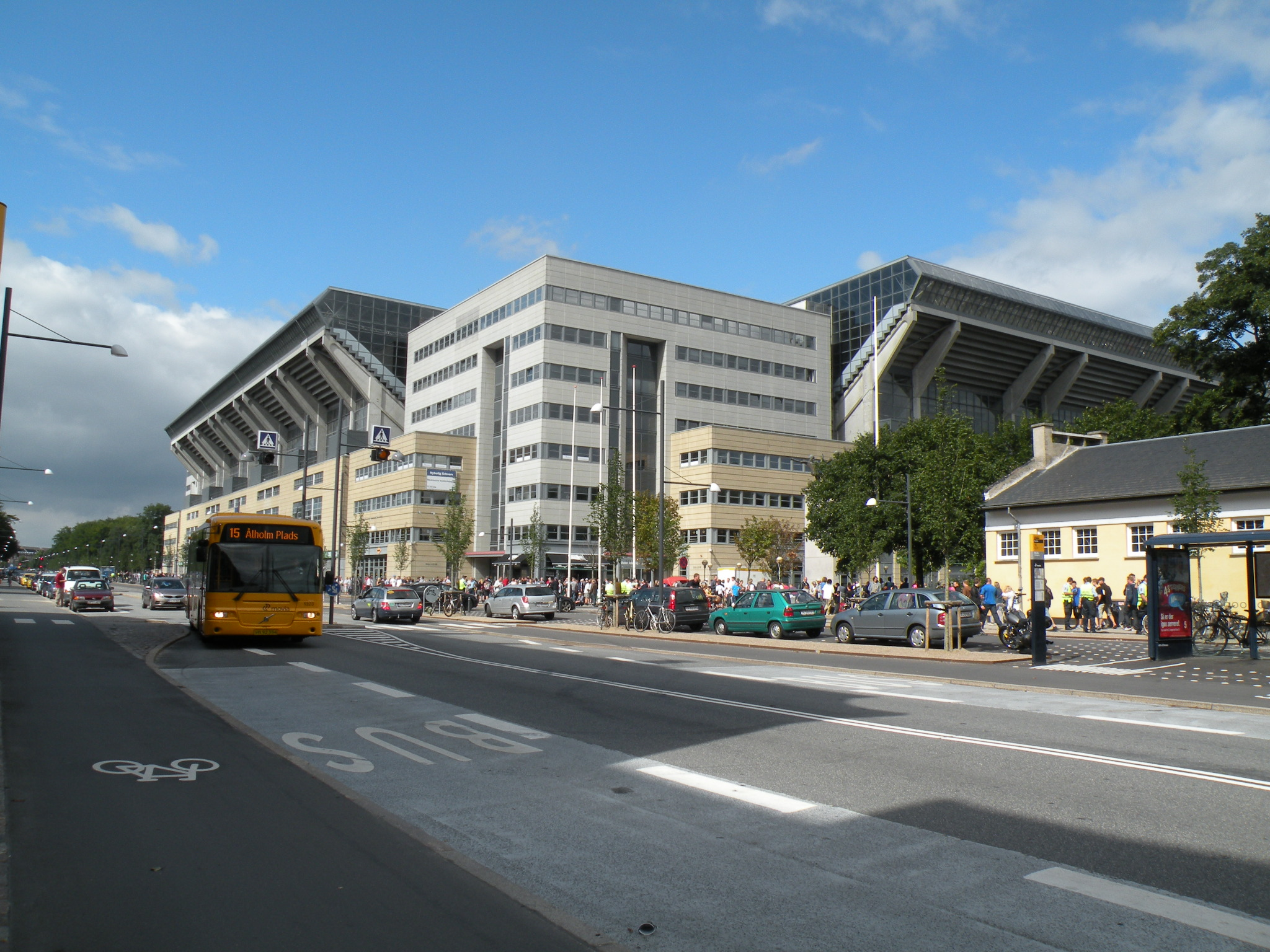 Parken viewed from Øster Allé in Copenhagen, Denmark